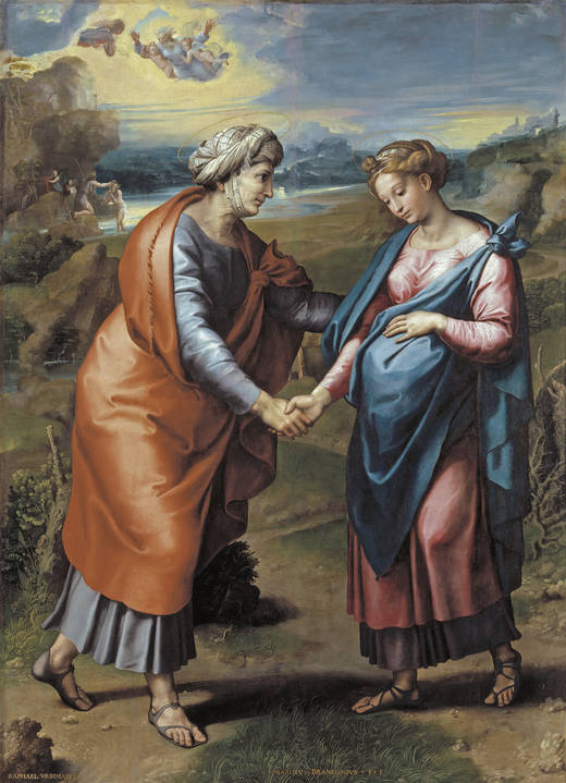 A visitação, c. 1517. Rafael e ateliê. Museu do Prado, Madri.